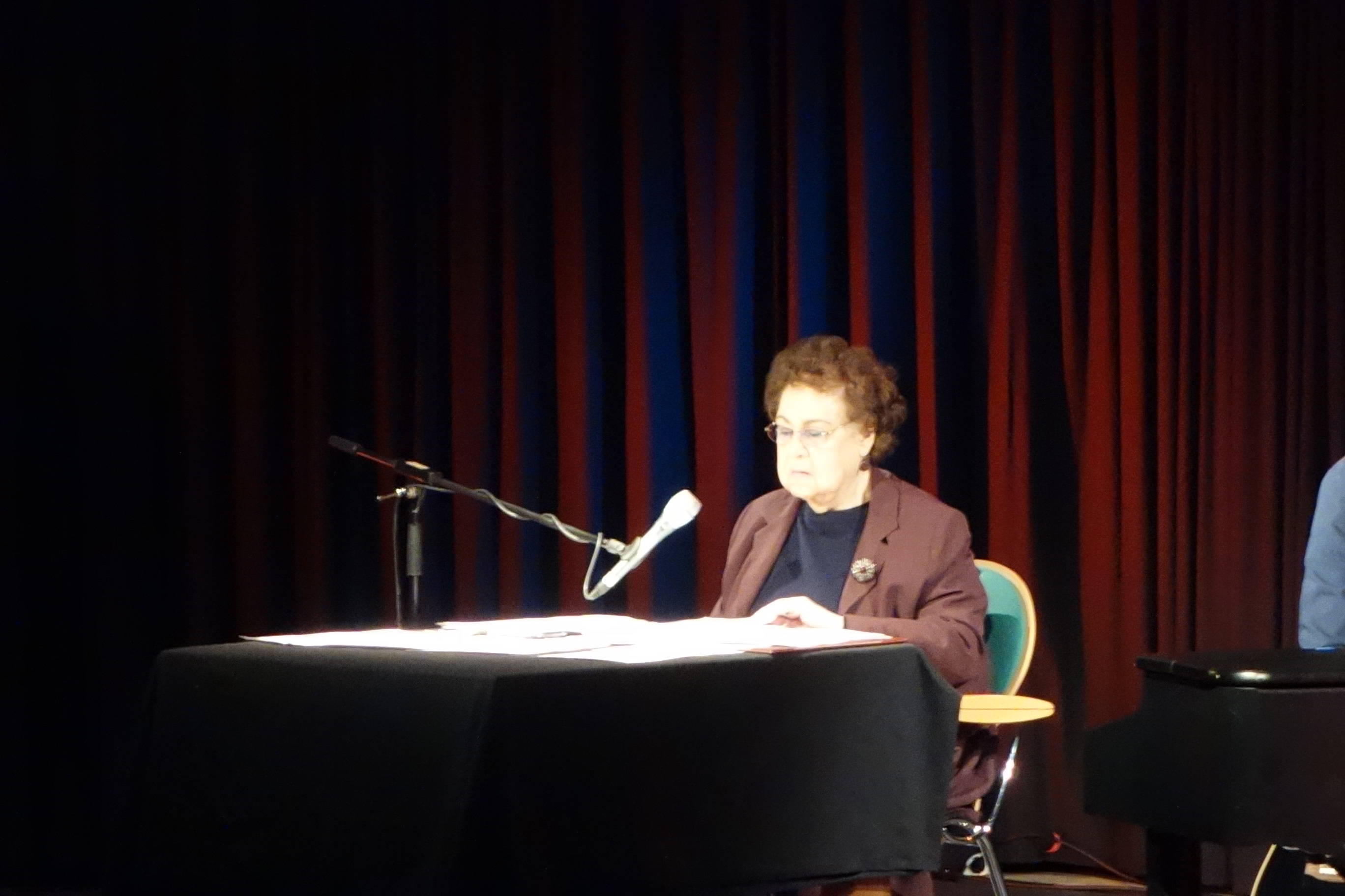 Gisela Steineckert, Q24, April 2017